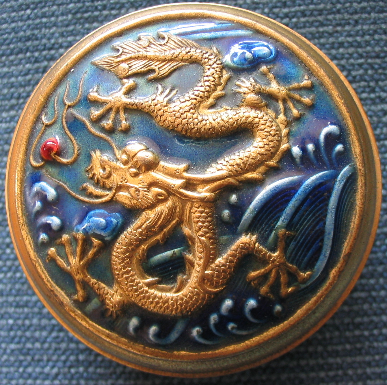 Dragon pillbox